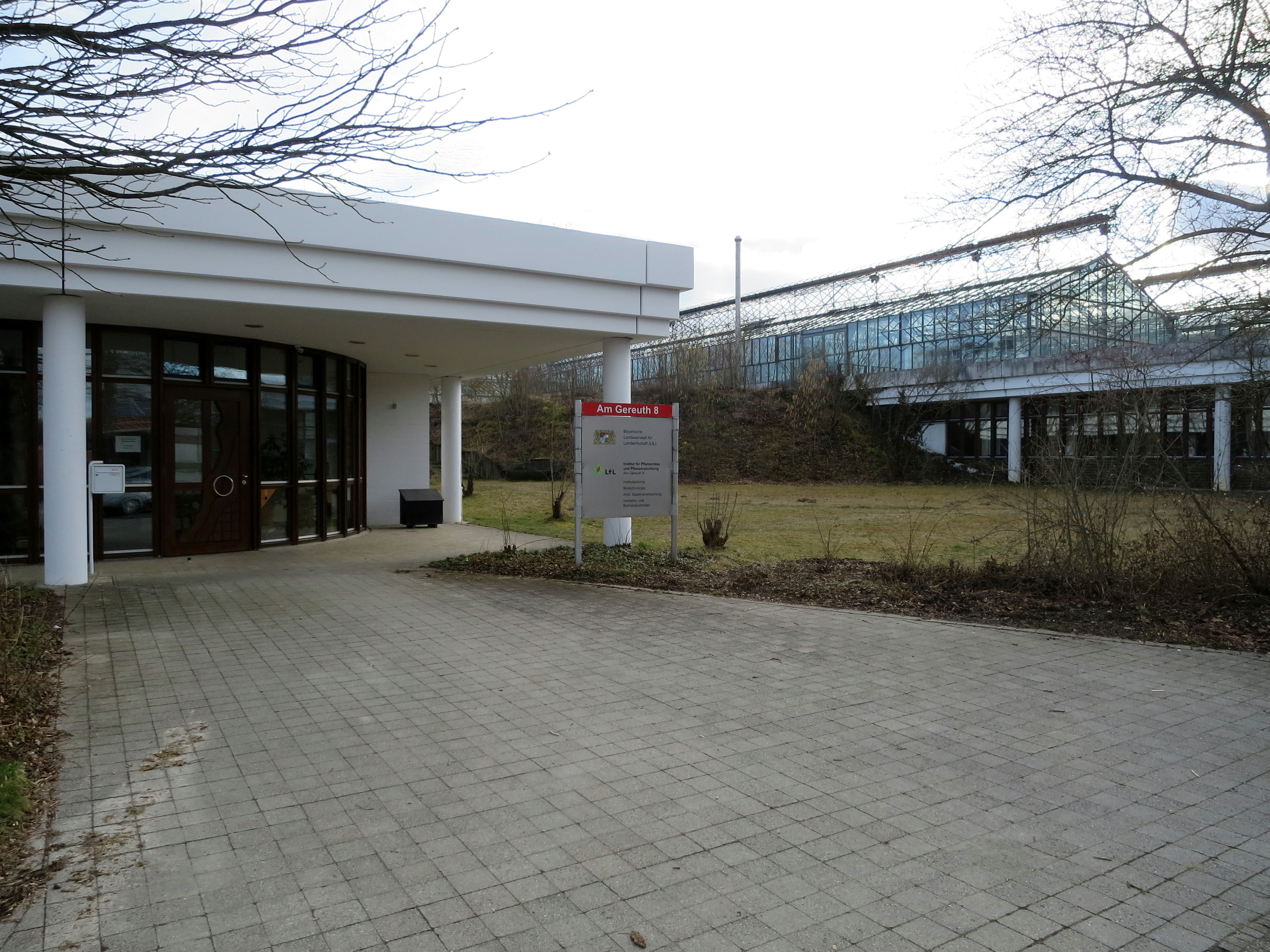 Im Nordteil des Campus Freising-Weihenstephan liegen die Gebäude der LfL